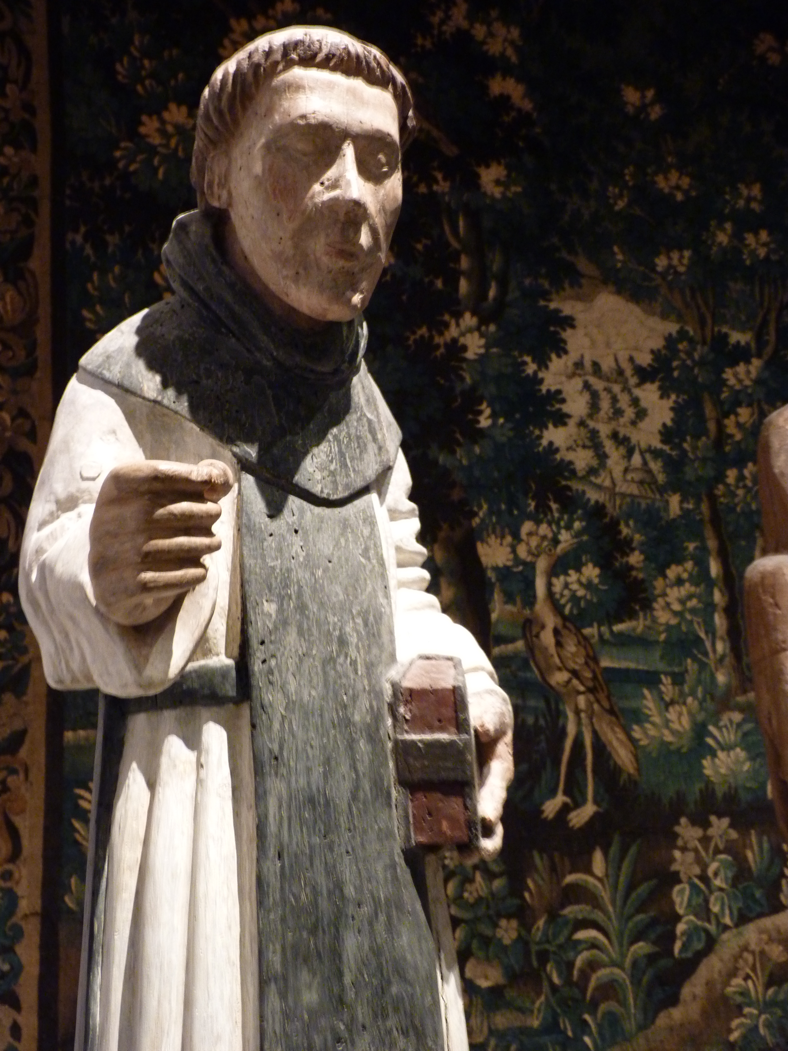 Statue en bois polychrome de Saint Vincent-Ferrier datant du XVème siècle Musée d'histoire et d'archéologie de Vannes - France